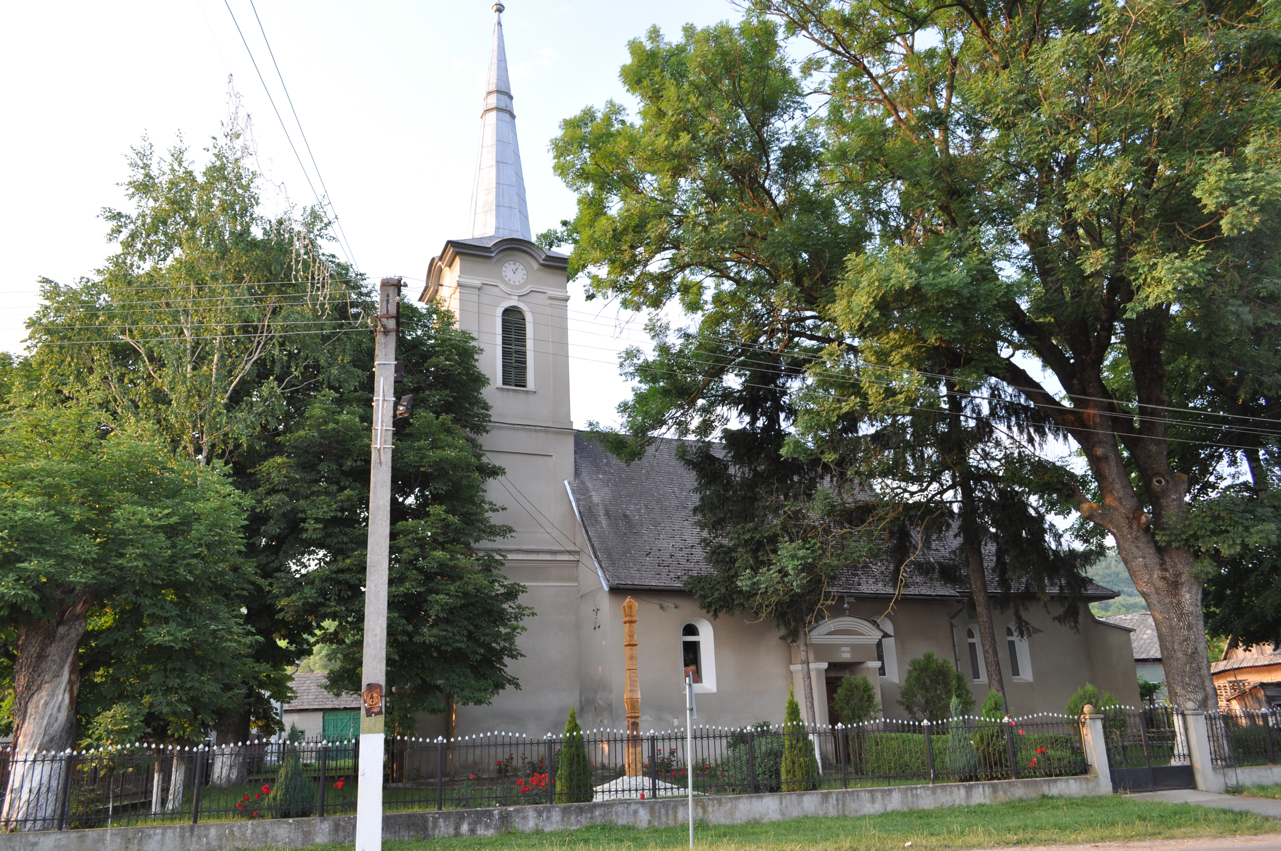 Nireș, județul Cluj